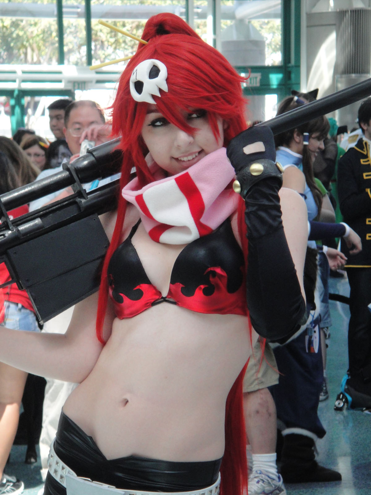 Anime Expo 2012